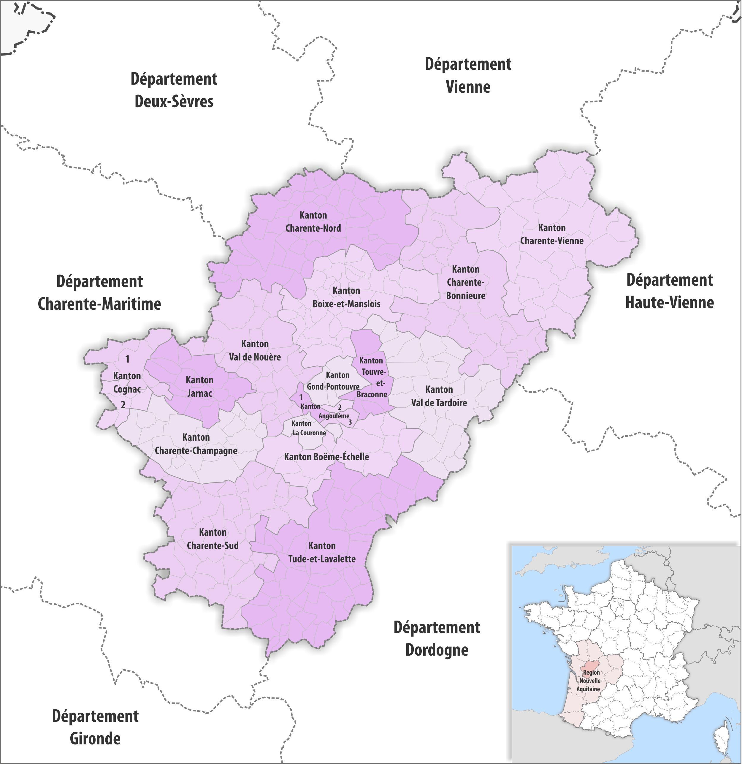 Gemeinden und Kantone im Departement Charente